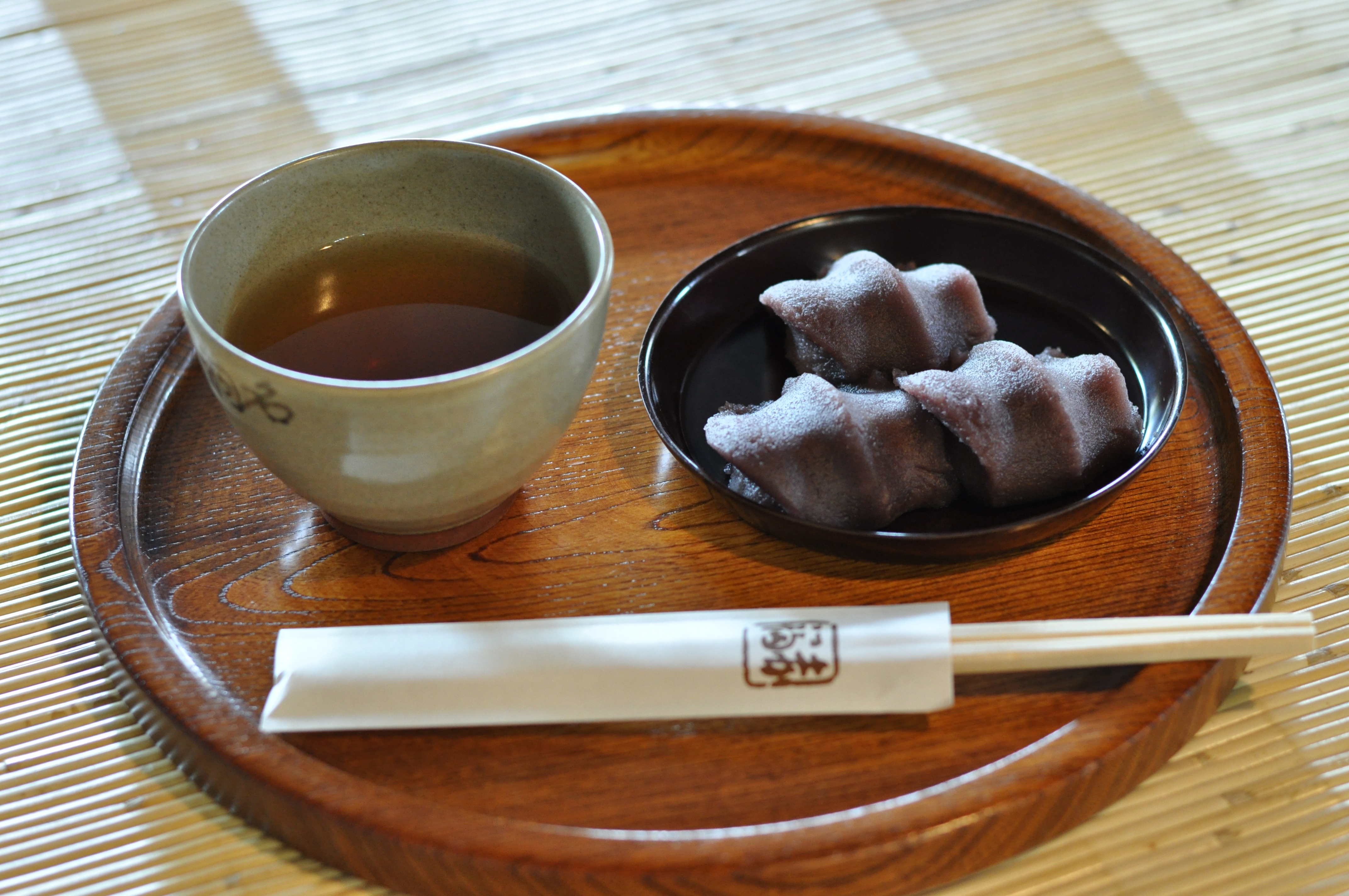 赤福餅 （店内で食べる用）